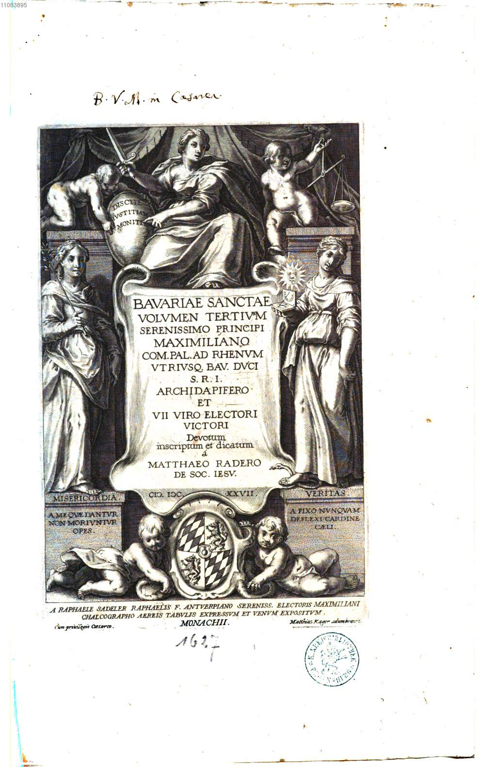 Matthäus Rader: Bavaria Sancta, Maximiliani Sereniss. Principis Imperii, Comitis Palatini Rheni, Vtrivsq. Bav. Dvcis Avspiciis, [Editio princeps], Bd.: 3, Monaci, (1627)